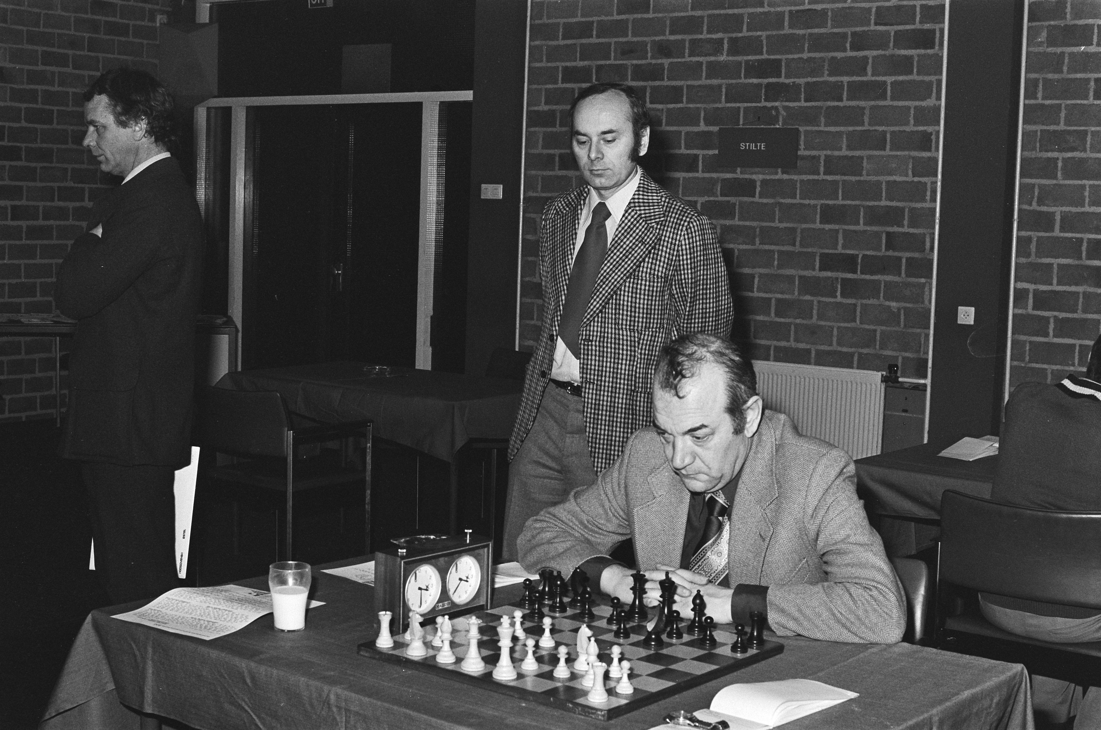 Collectie / Archief : Fotocollectie Anefo Reportage / Serie : [ onbekend ] Beschrijving : Hoogovenschaaktoornooi, laatste ronde; winnaar Portisch kijkt bij Kortsjnoj Datum : 2 februari 1978 Trefwoorden : schaken Persoonsnaam : Kortsjnoi, Viktor Instellingsnaam : Hoogovenschaaktoernooi Fotograaf : Peters, Hans / Anefo Auteursrechthebbende : Nationaal Archief Materiaalsoort : Negatief (zwart/wit) Nummer archiefinventaris : bekijk toegang 2.24.01.05 Bestanddeelnummer : 929-5552